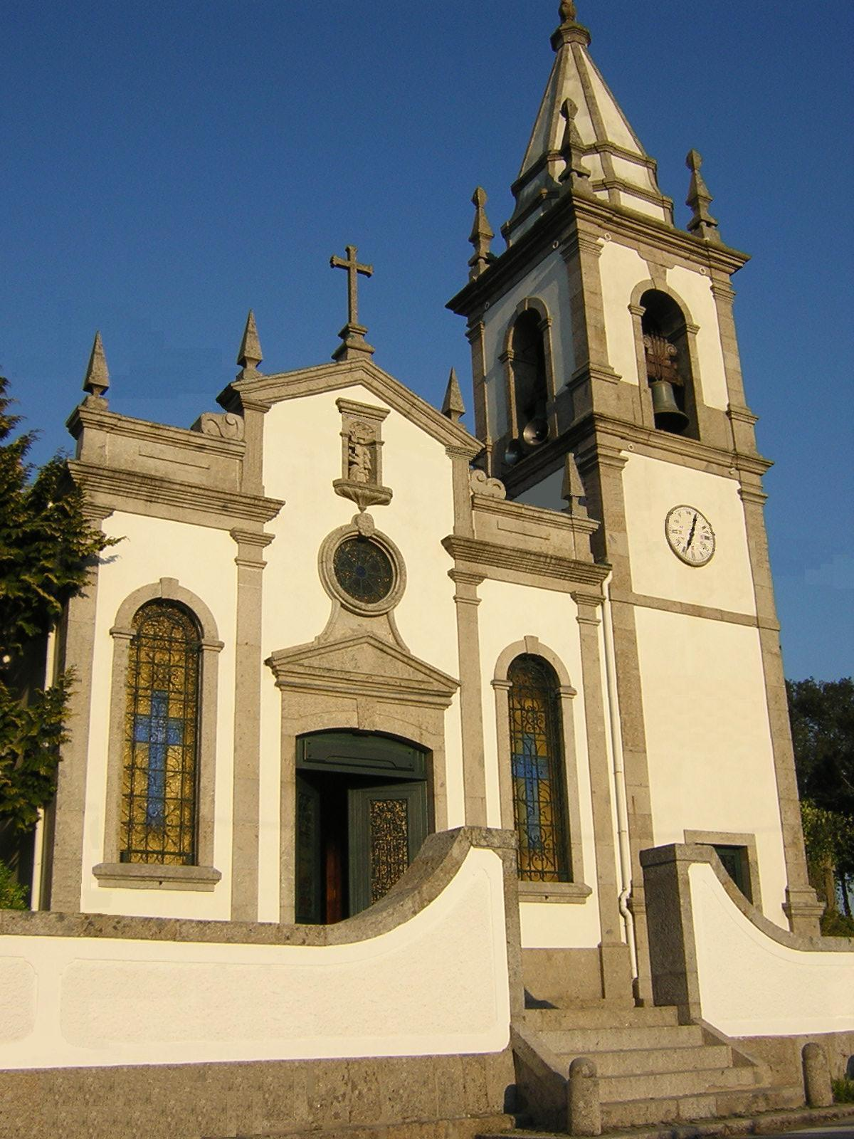 Igreja Paroquial de Santa Eulália de Sobrosa - Paredes - Portugal